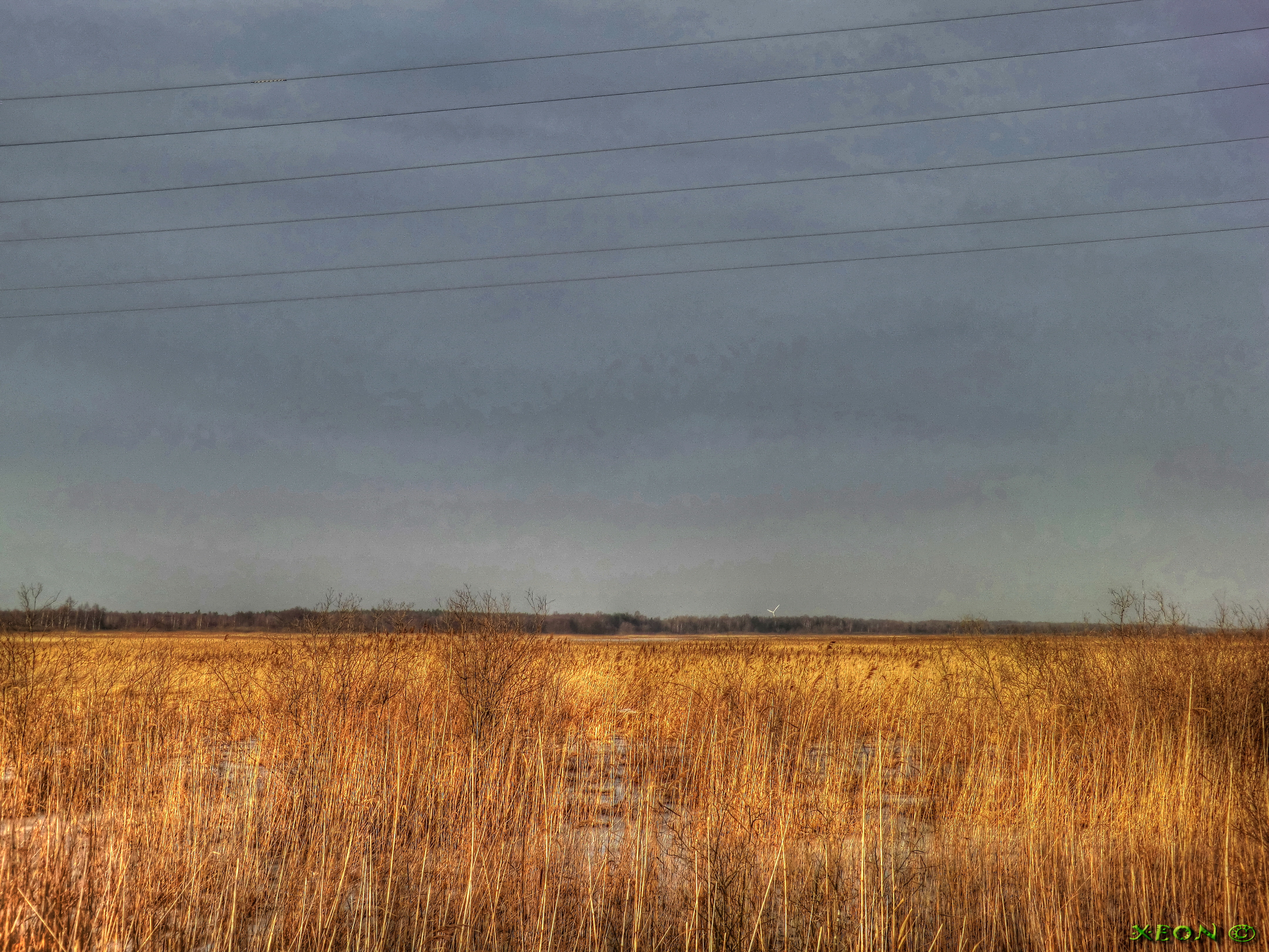 Tosmares Lake